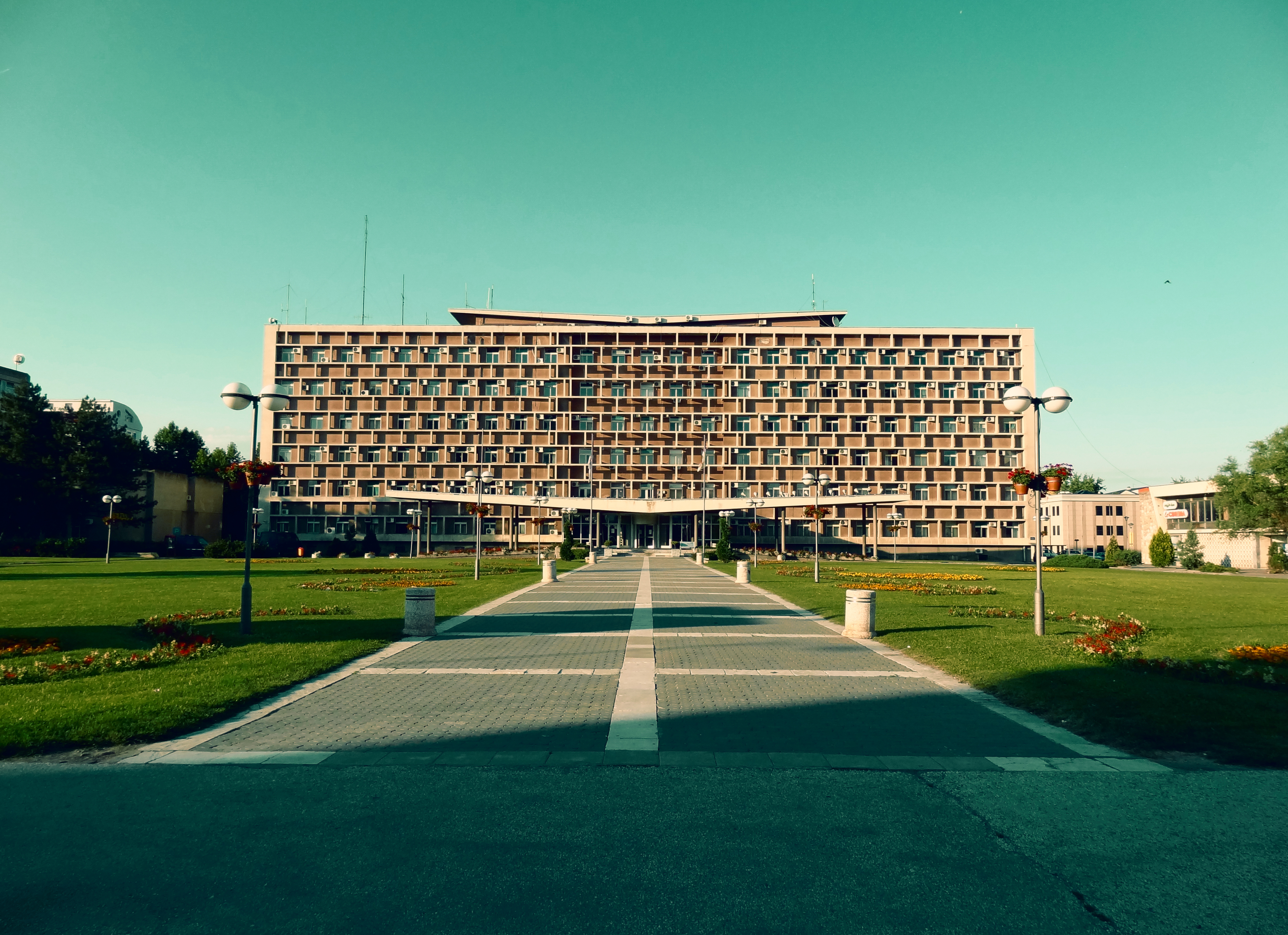 Opstina Kragujevac